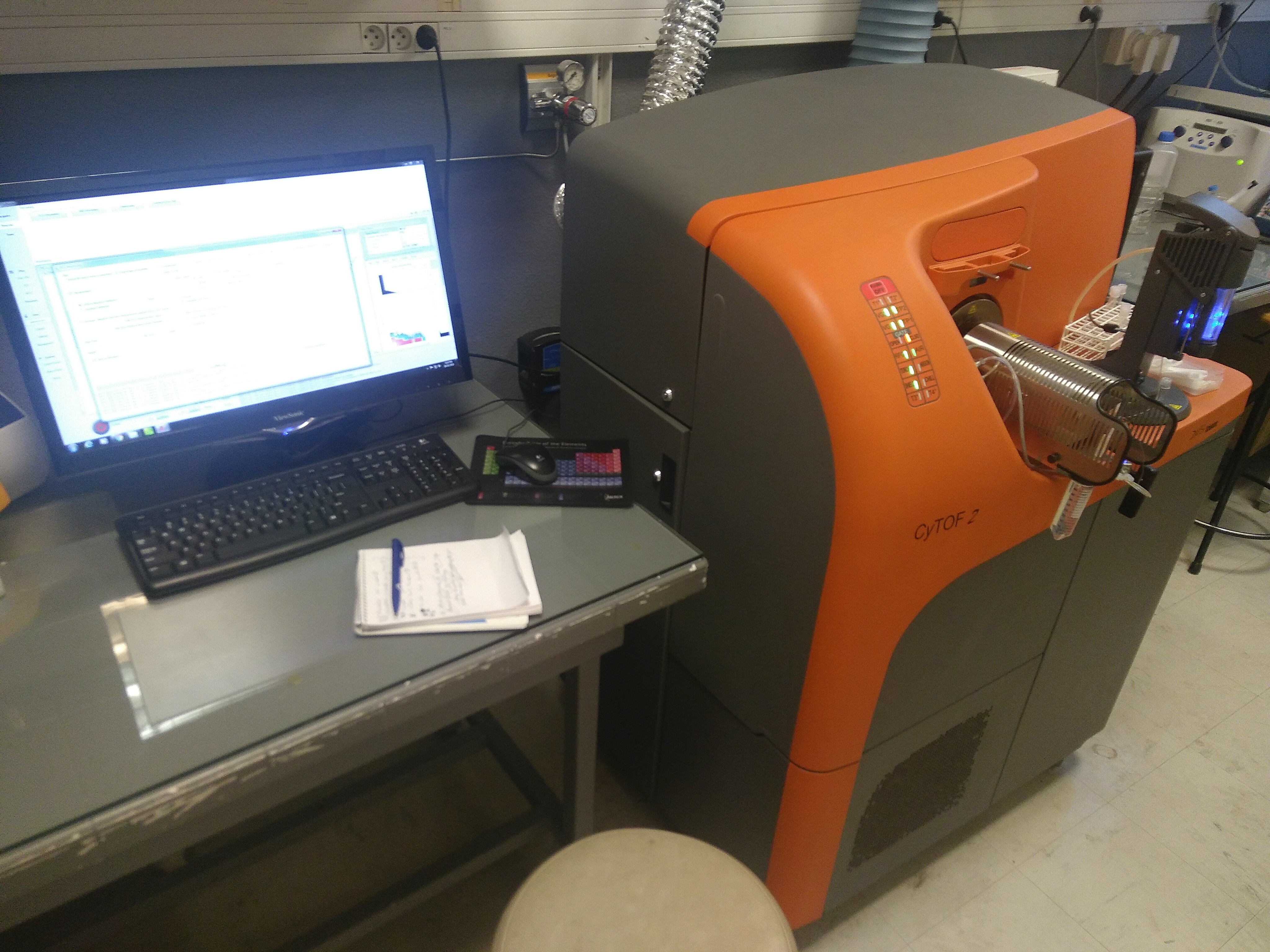 Photographie représentant un poste de travail (ordinateur) et d'un cytomètre de masse.